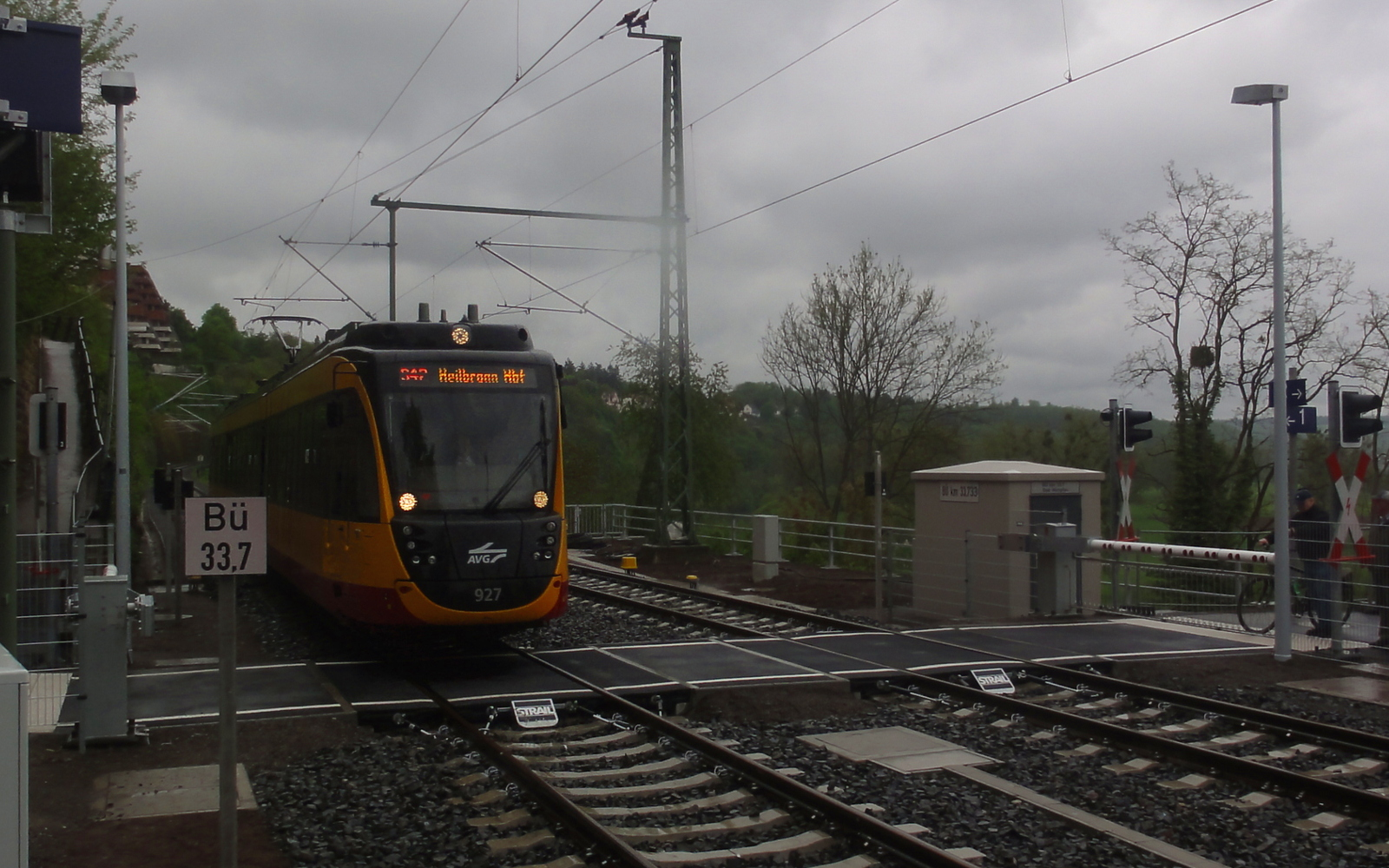 ET2010 927 (9480 0450 927-9) der AVG bei der Einfahrt in Bad Wimpfen, beim Überqueren des Bahnübergangs.